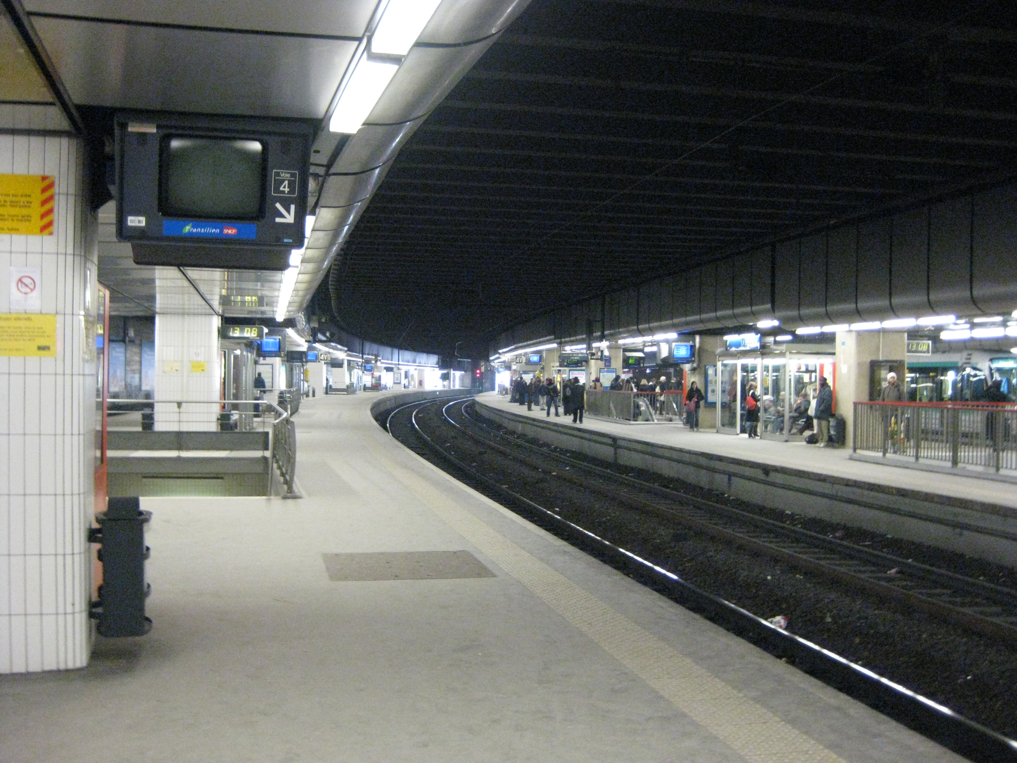 Transilien U (stanice La Défense).